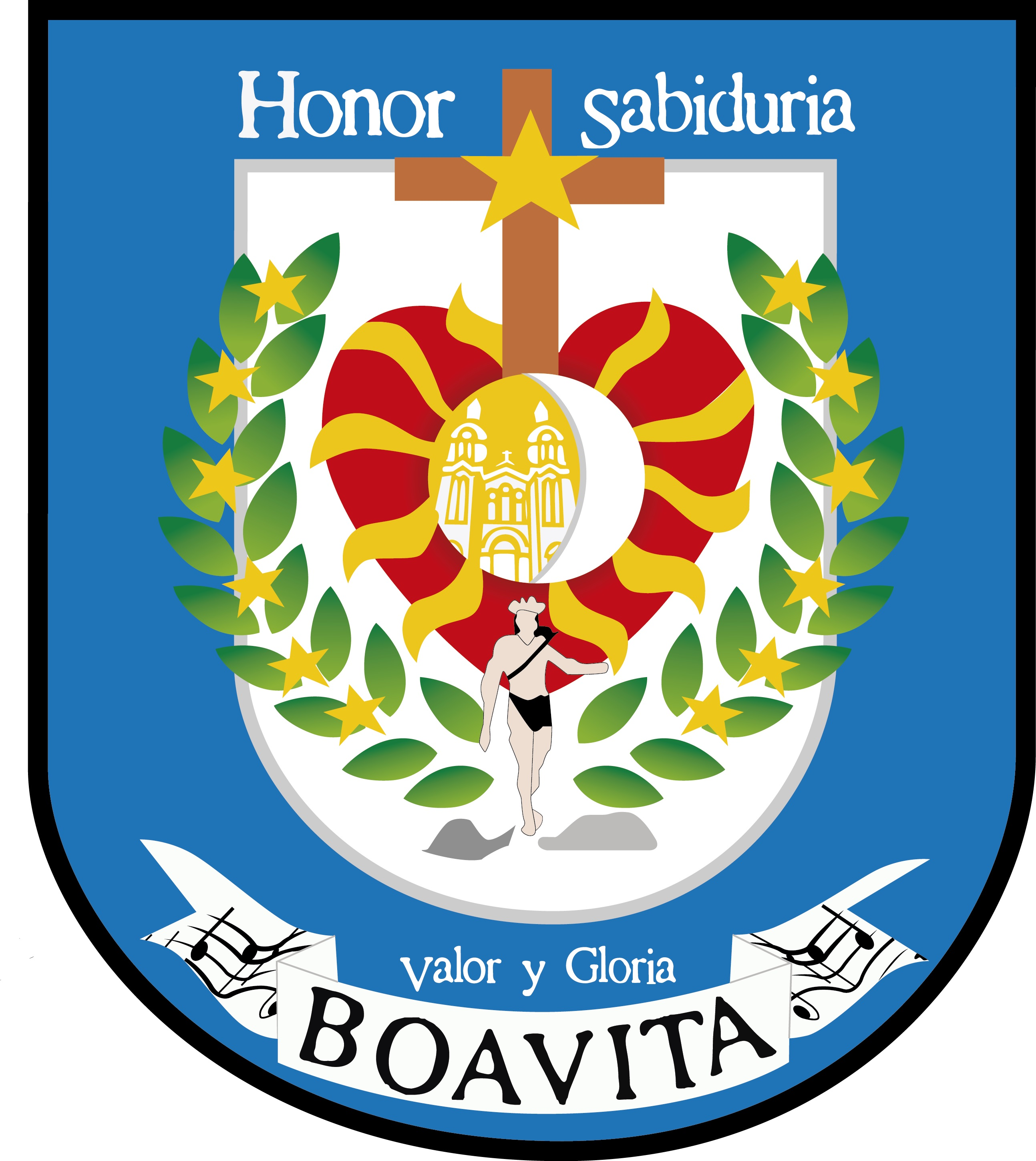 Diseño :FABIO FIGUEROA JIMENEZ , ANA ISABEL SUAREZ RISCANEVO. APROBADO MEDIANTE ACUERDO NRO 034 DE DICIEMBRE 31 DE 2009. EXPLICACION: El fondo total del Escudo está conformado por color blanco y el Azul bordeado de negro que presentan la bandera del municipio y el marco en forma de U, presenta la Unidad de nuestra Población. Está conformado por 02 cuarteles: EL CUARTEL CENTRAL de color blanco, se ubica un corazón que define el slogan “CORAZON DEL NORTE”. Un sol y la figura del cacique Boavita, descendiente de los Guanes que presenta nuestros ancestros Boavitanos para mostrar el significado de BOAVITA “ PUNTA DEL SOL”, Una media Luna Blanca, que exalta la primera estrofa del Himno a Boavita, El Templo y la Santa Cruz de Sacachova, las máximas representaciones de nuestro Municipio y demuestra nuestro arraigo religioso. Las trece estrellas también incluidas en la bandera representan nuestras veredas dando sentido en la estrella grande al Nombre de la Parroquia y de Nuestra Patrona. Los Laureles, representan los honores y glorias de nuestros ilustres Boavitanos en los diferentes campos sociales. El cuartel Exterior de color azul bordeado de negro, contiene las palabras: HONOR, SABIDURIA, VALOR Y GLORIA que dan describen la personalidad de nuestra Comunidad Boavitana. El pergamino y las notas Musicales representan las artes del Municipio en las que hemos surgido culturalmente.